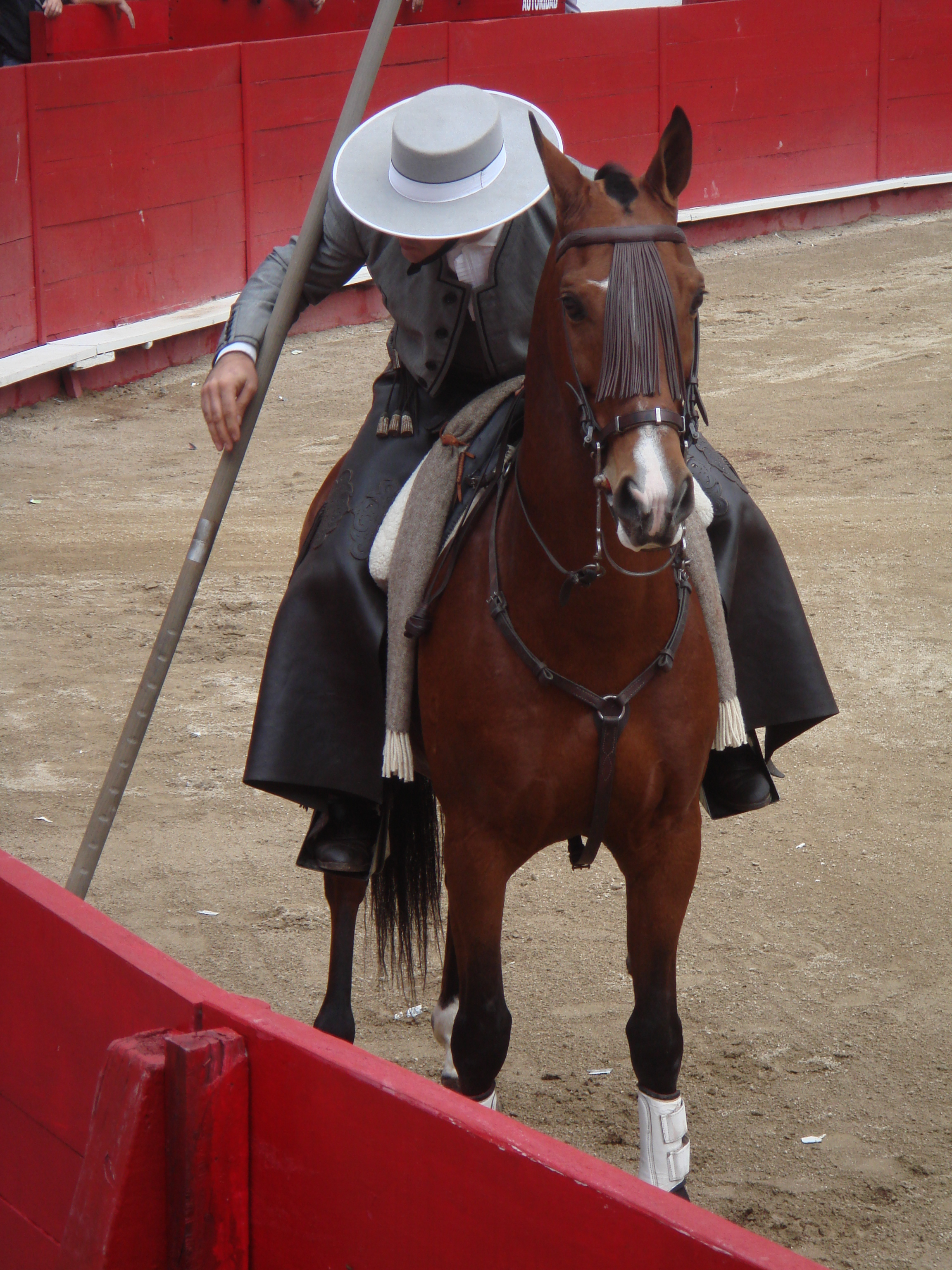 Rejoneador Álvaro Montes preparado para recibir con la garrocha al toro.